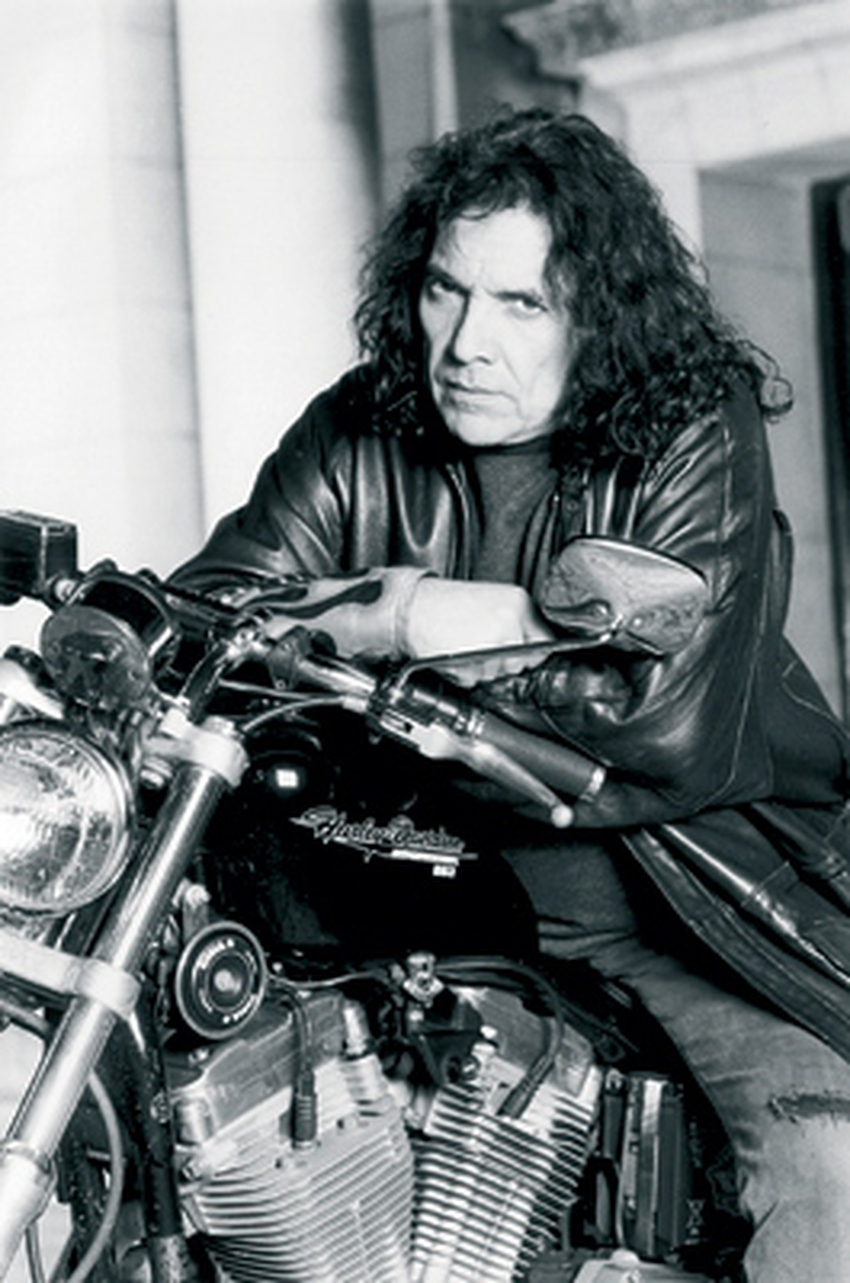 Norberto "Pappo" Napolitano